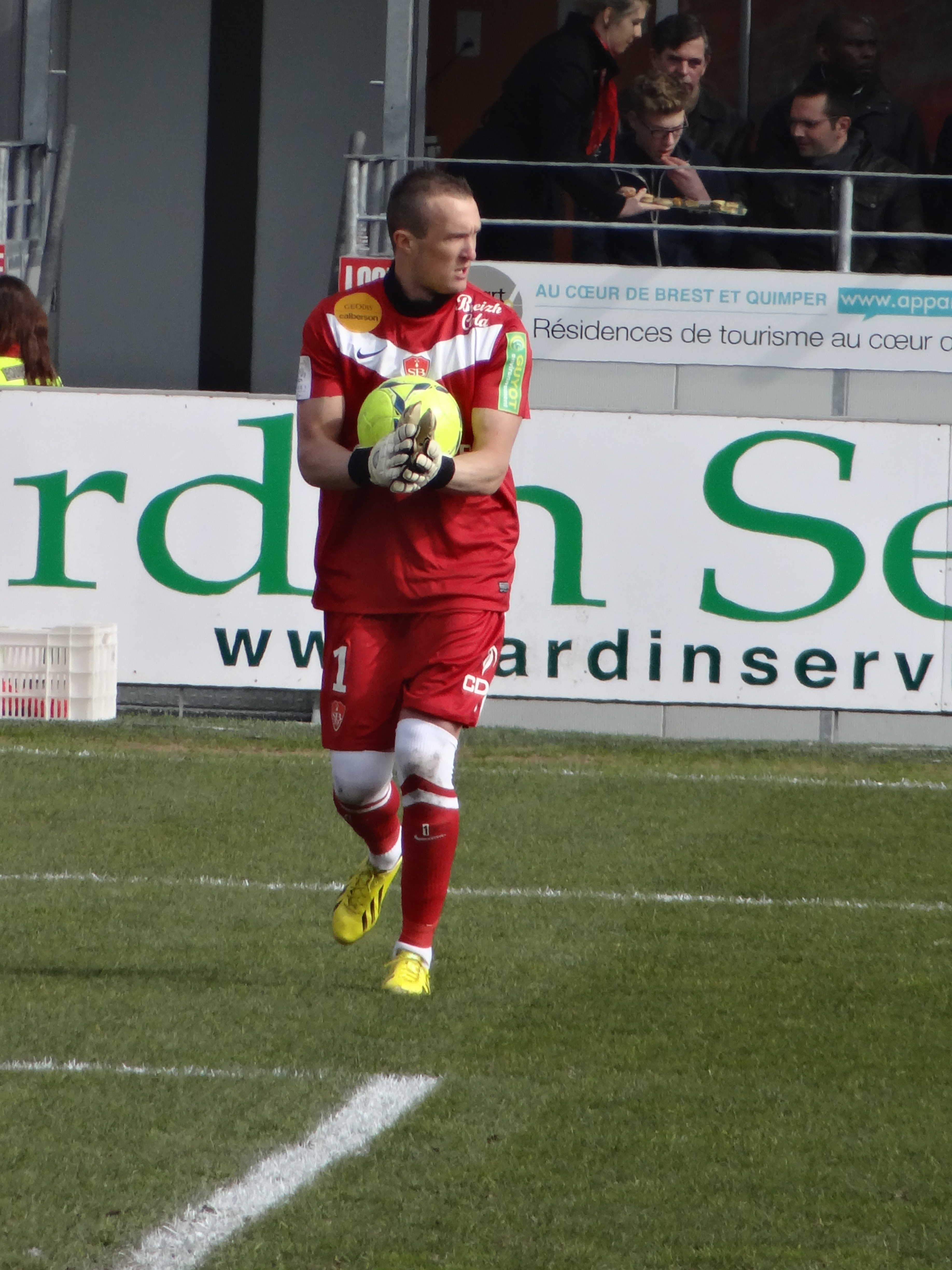 Match de football (Ligue 1) entre le Stade brestois 29 et l'Olympique lyonnais, le 3 mars 2013